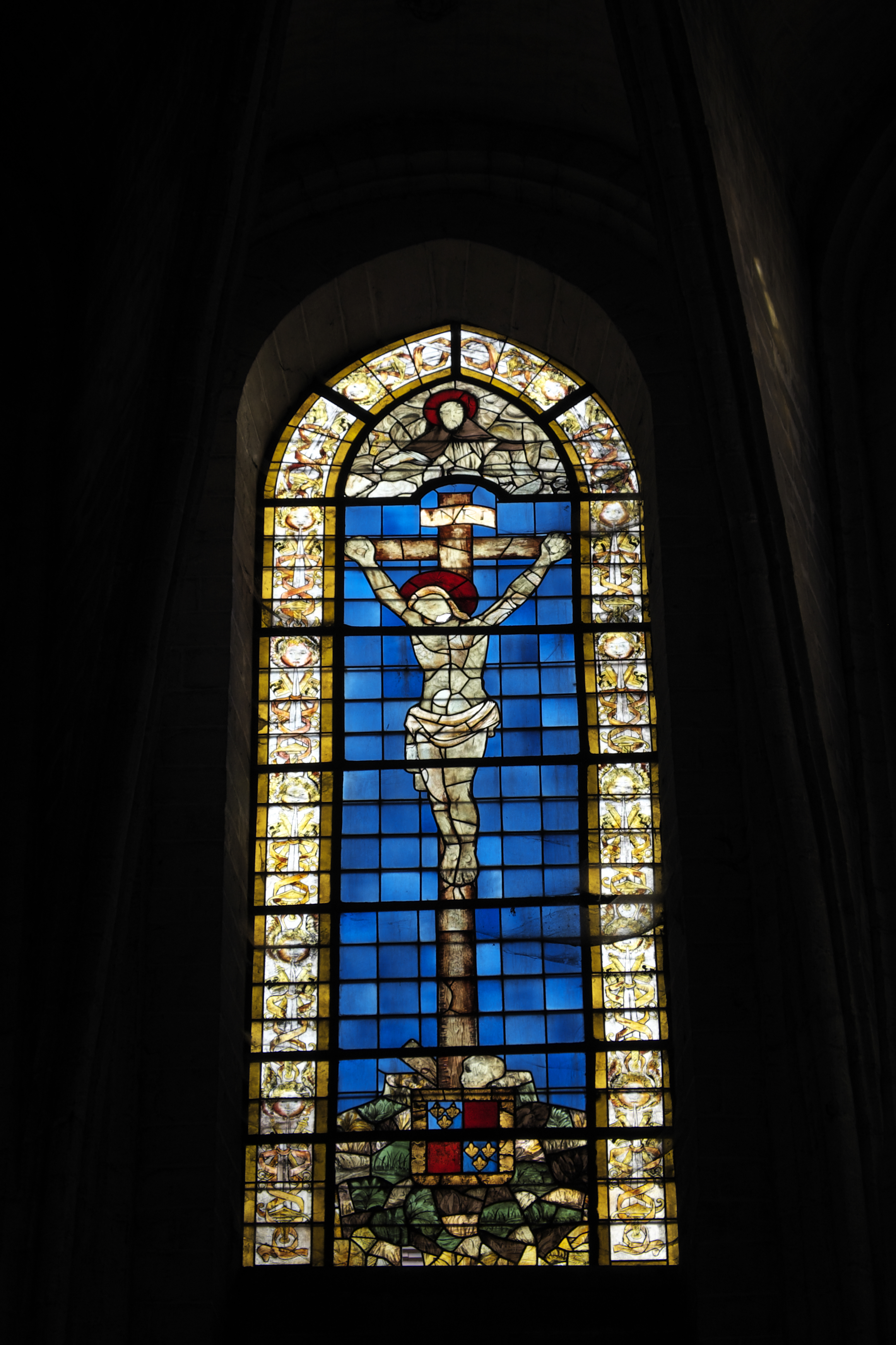 Katholische Kirche Saint-Pierre in Dreux im Département Eure-et-Loir (Centre-Val de Loire/Frankreich), Bleiglasfenster (baie 100), oberes Chorfenster aus dem 15. Jahrhundert, 1753 von Jean le Vieil restauriert; Darstellung: Christus am Kreuz, unten Wappen von Charles d'Albret